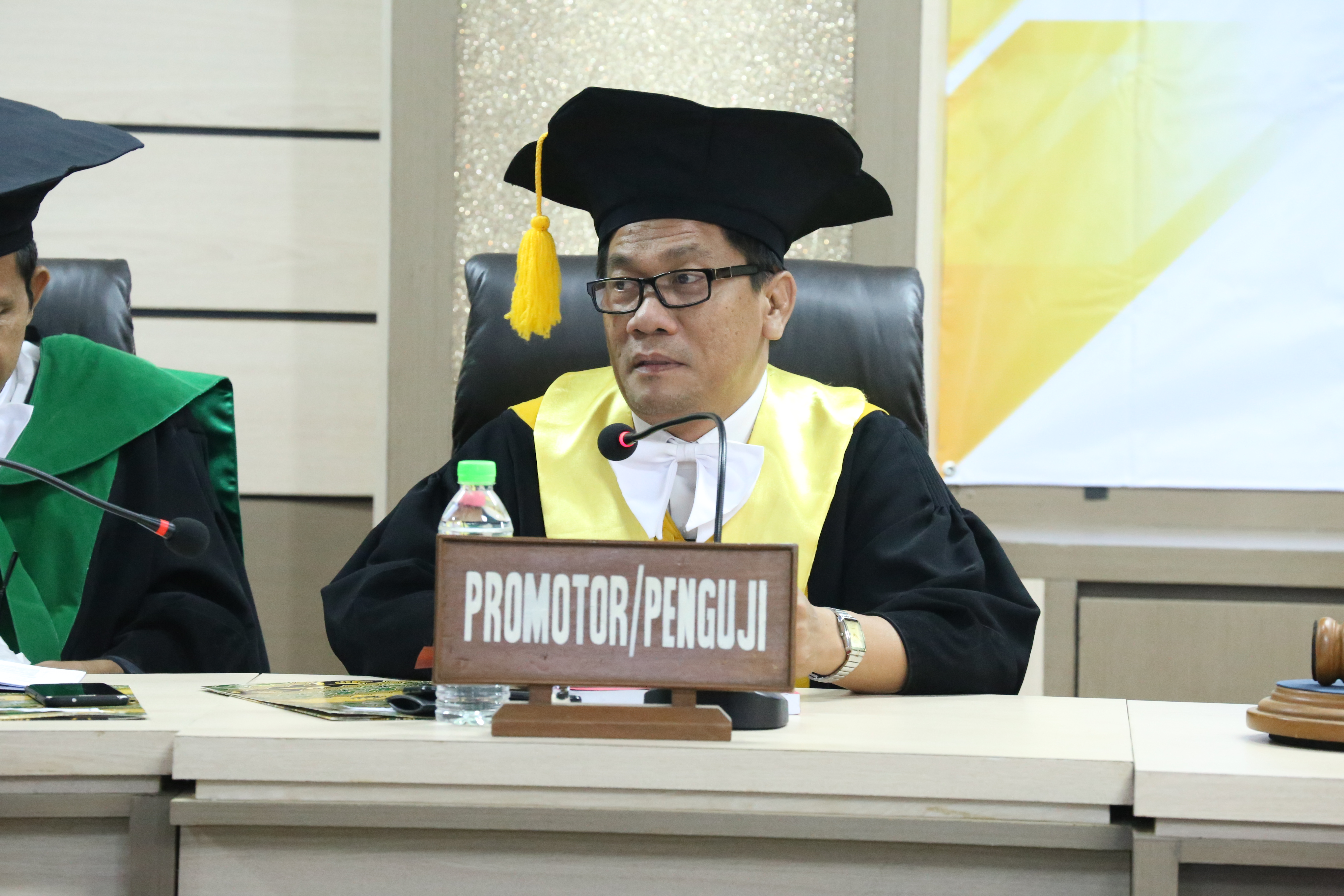 Foto Prof. Dr. H. Dudung Abdurahman, M.Hum saat menjadi penguji kandidat Doktor di UIN Sunan Kalijaga Yogyakarta